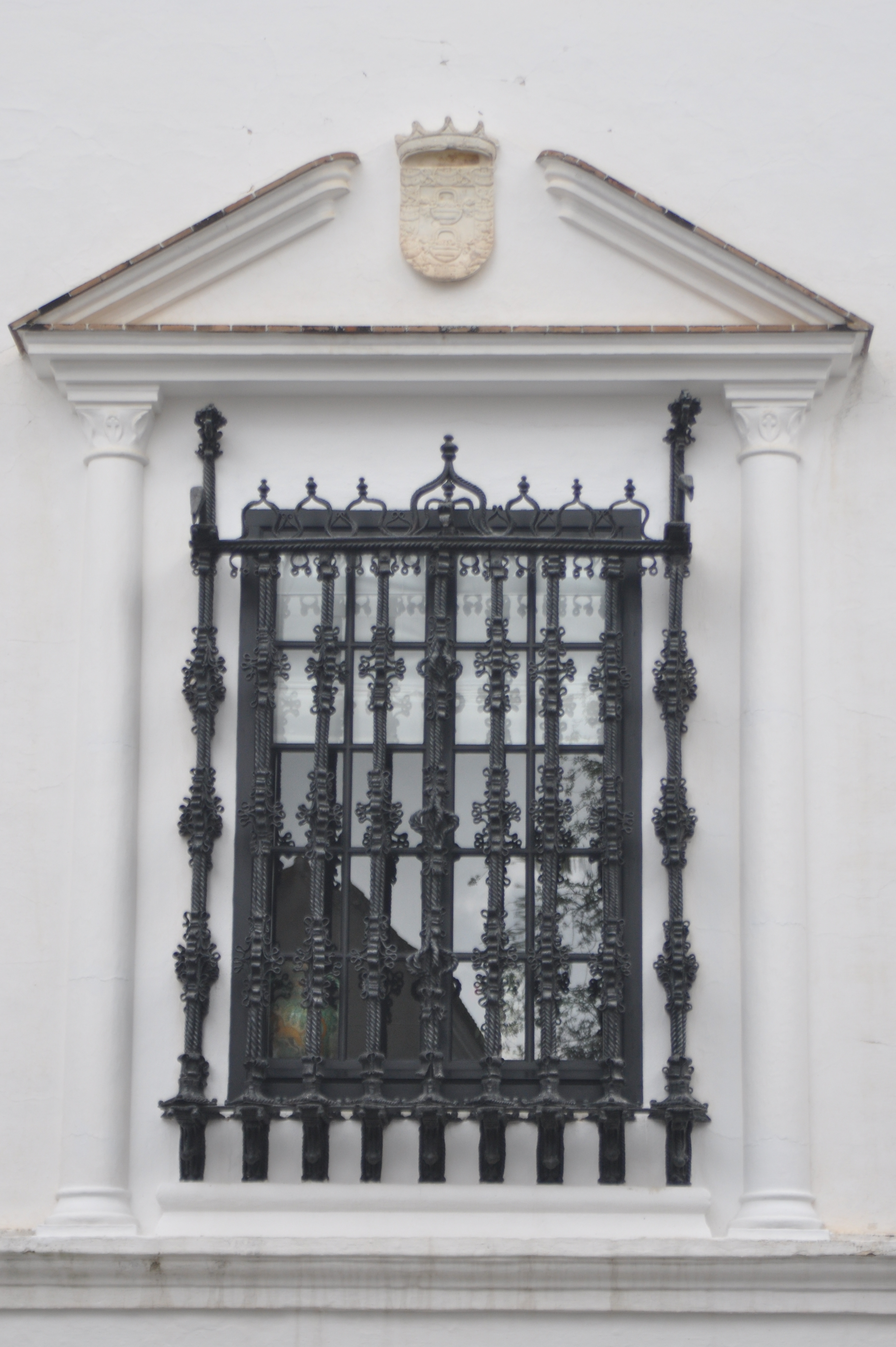 Reja del palacio de los duques de Medina Sidonia en Sanlúcar de Barrameda (Cádiz, España)